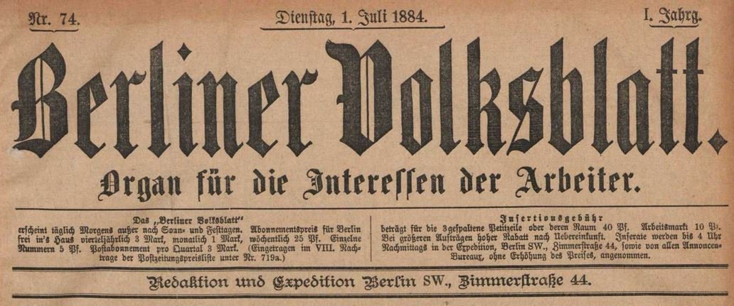 Zeitschrift Berliner Volksblatt